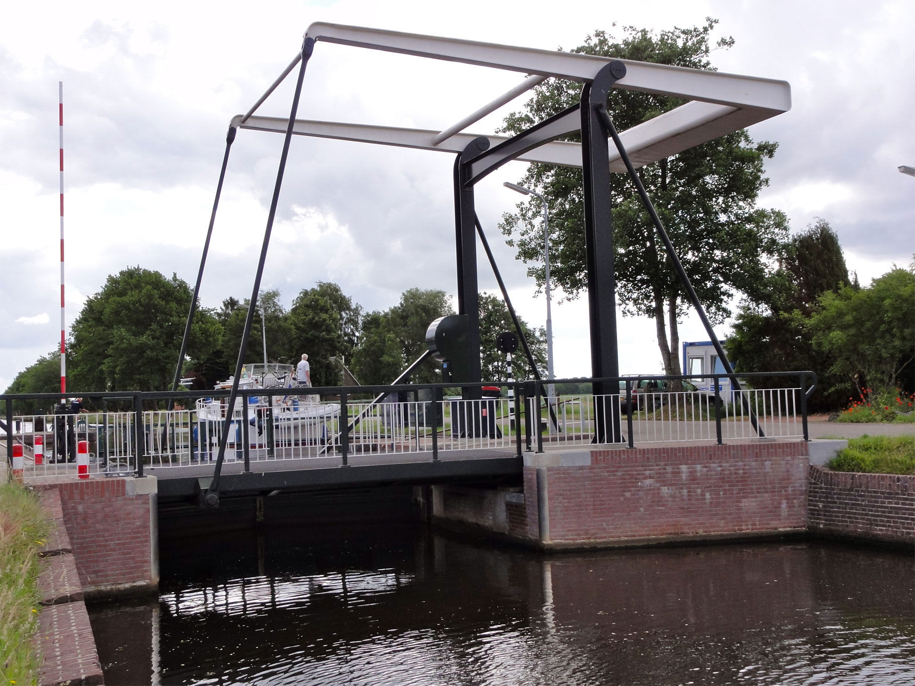 Opsterlandse Compagnonsvaart bij Hemrikerverlaat